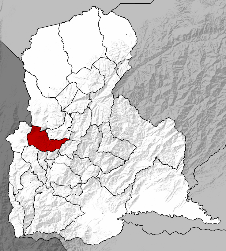 Municipio Lobatera - Táchira